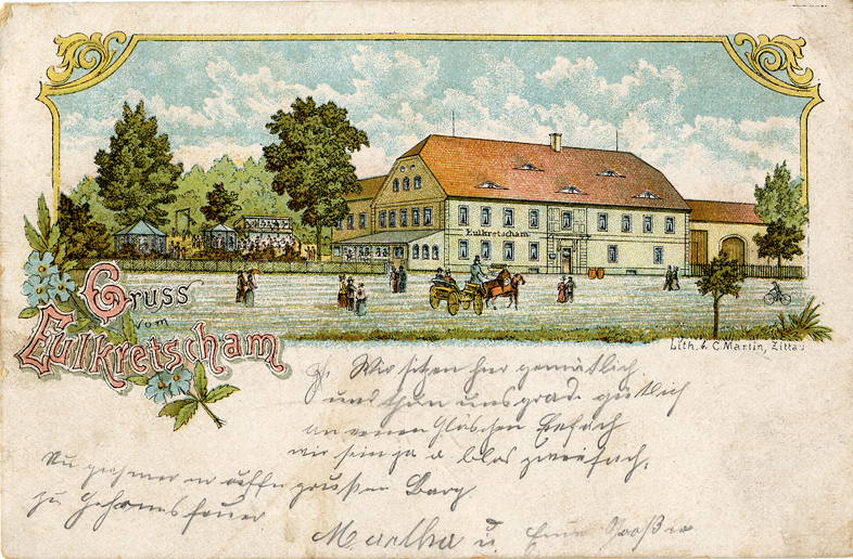 Eulkretscham, lithographierte Postkarte.